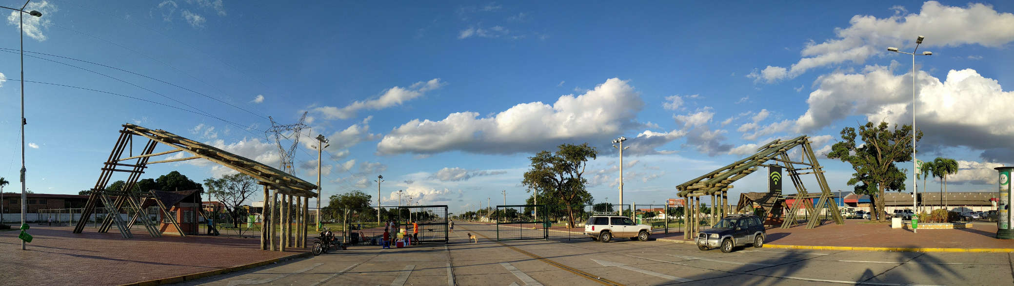 Parque Cambódromo, Santa Cruz, SC, Bolivia. Ingreso sur, visto desde el Cuarto Anillo.